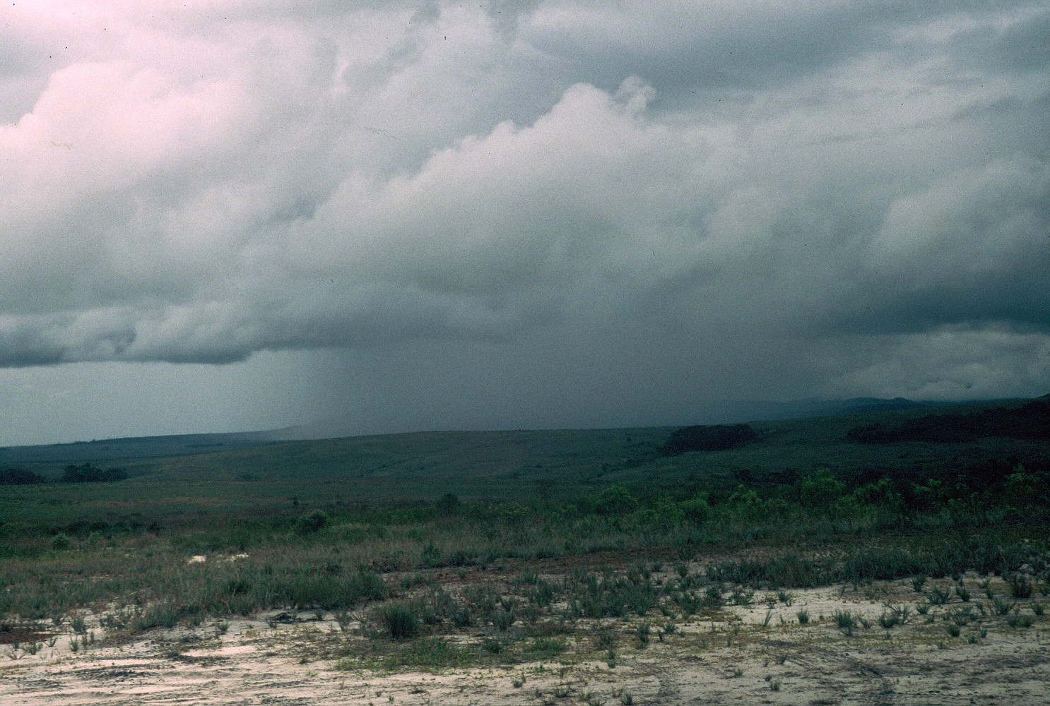 Lluvia en La Gran Sabana, entre San Rafael de Kamoirán y el Salto Kamá